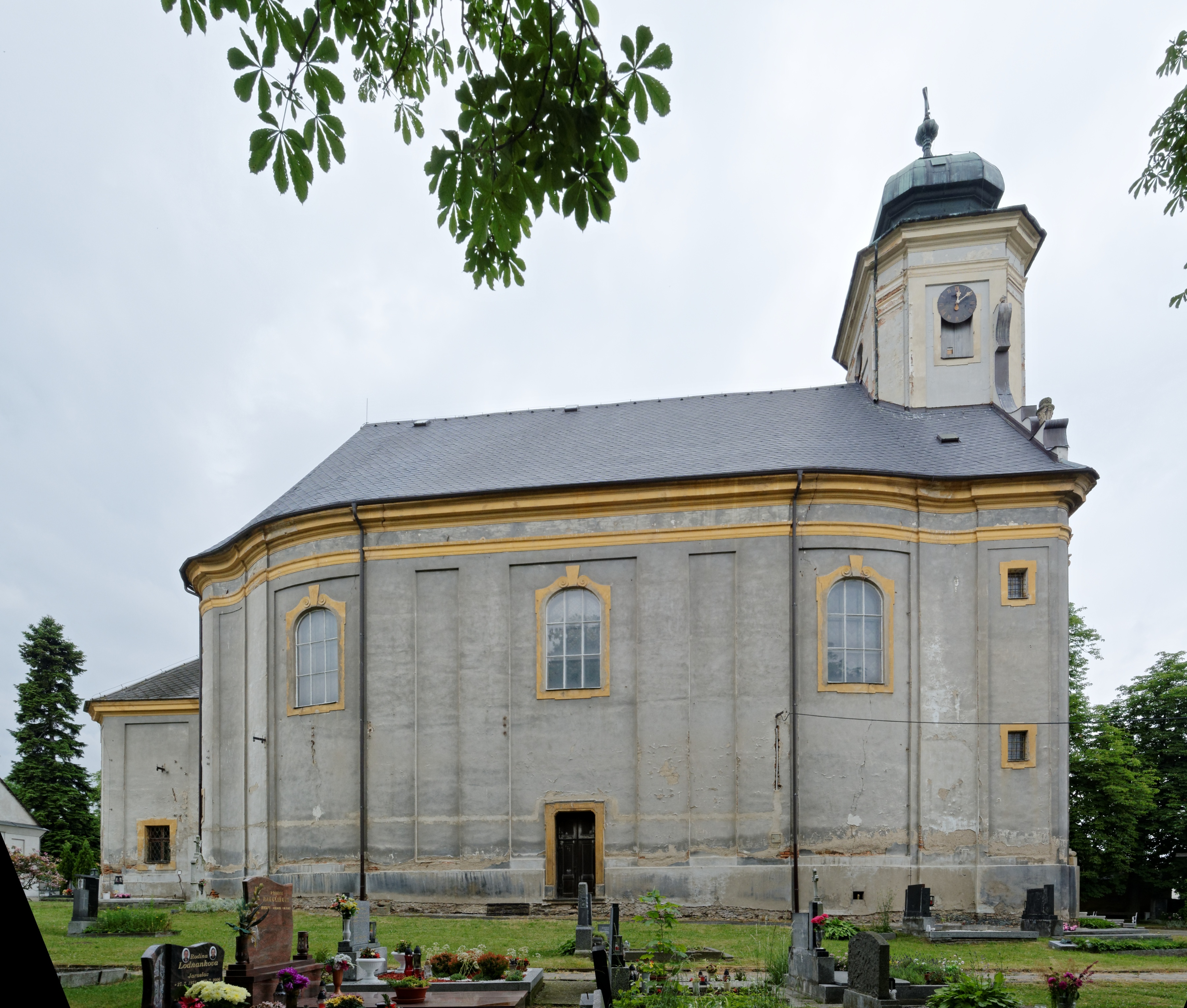 Kostel Neposkvrněného Početí Panny Marie, Velké Heraltice. Pohled od jihovýchodu.